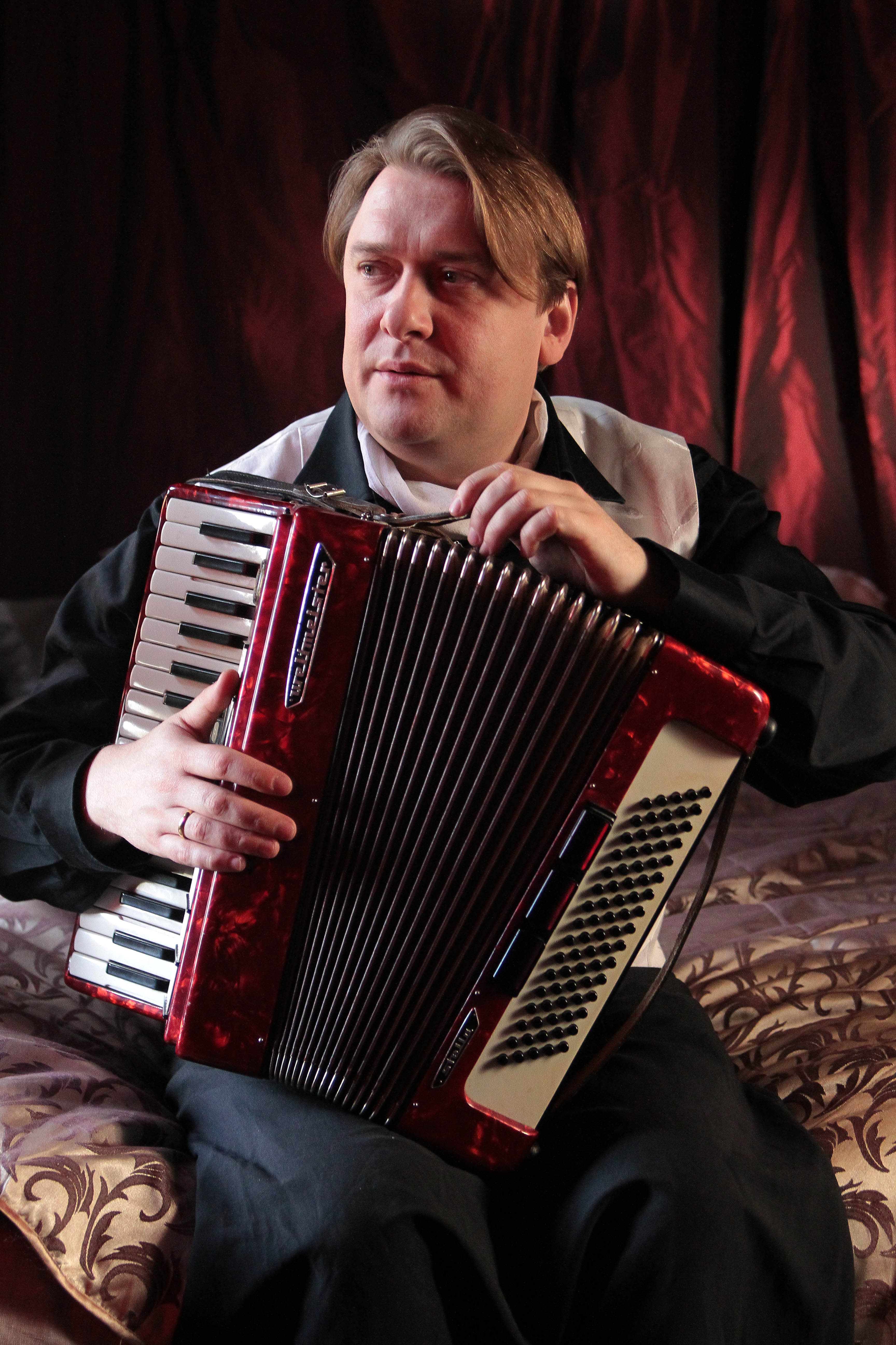 Valmieras drāmas teātra aktieris Imants Strads